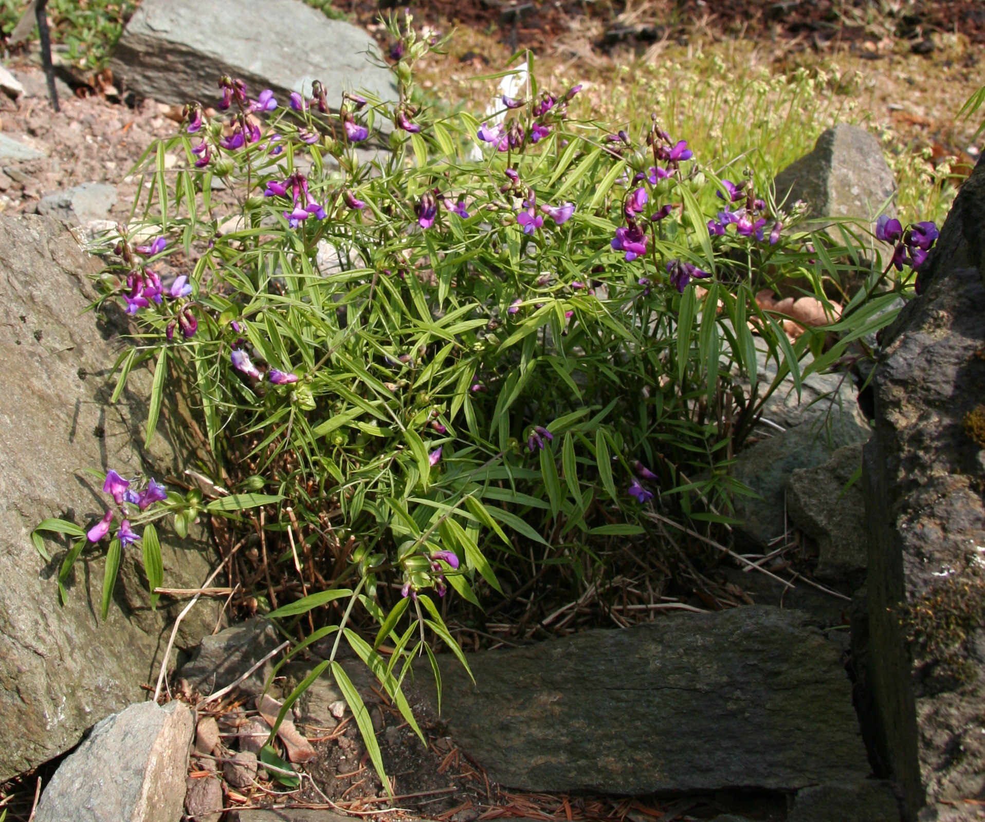 Lathyrus alpestris im Botanischen Garten Dresden